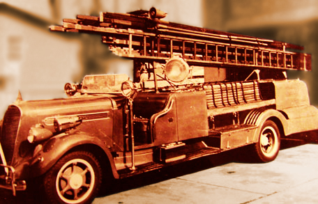 Carro Tobalaba, Portaescalera de la Sexta Compañía "Bomba La Reina" (Studebaker 1936)